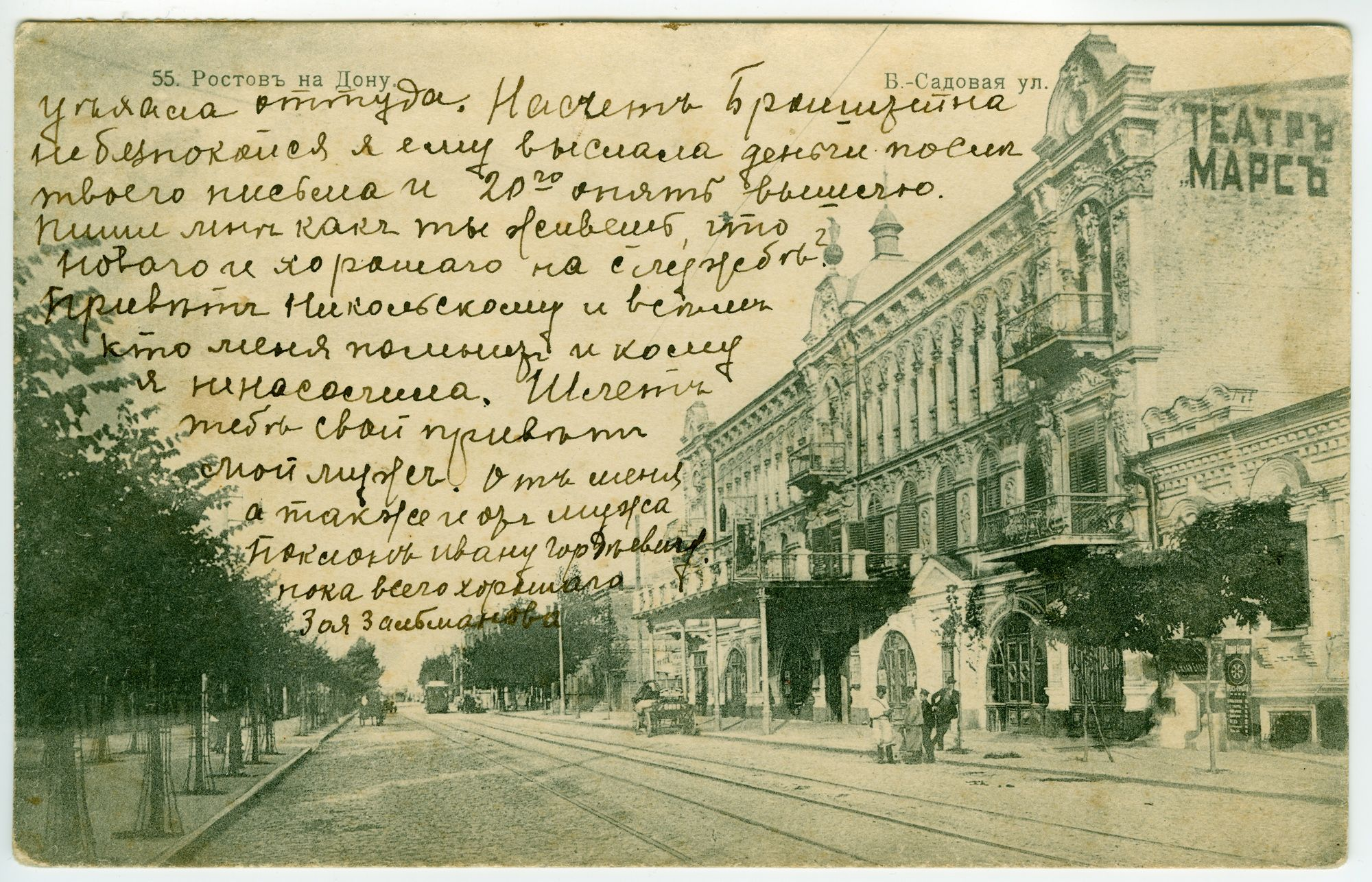 Ростов на Дону кафе Марс Дом К.В. Чарахчианца